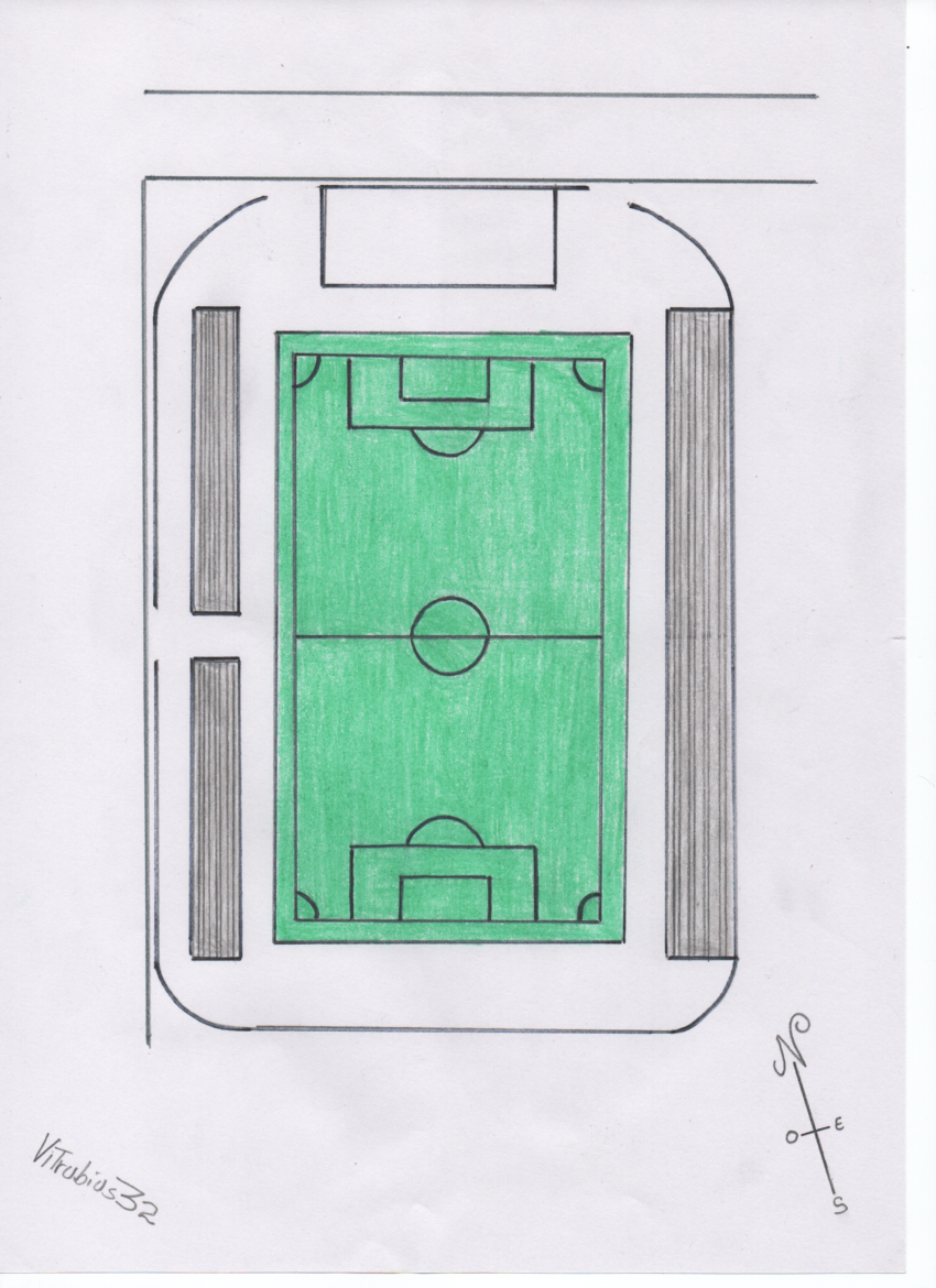 Estadio Sergio Anonio Reyes